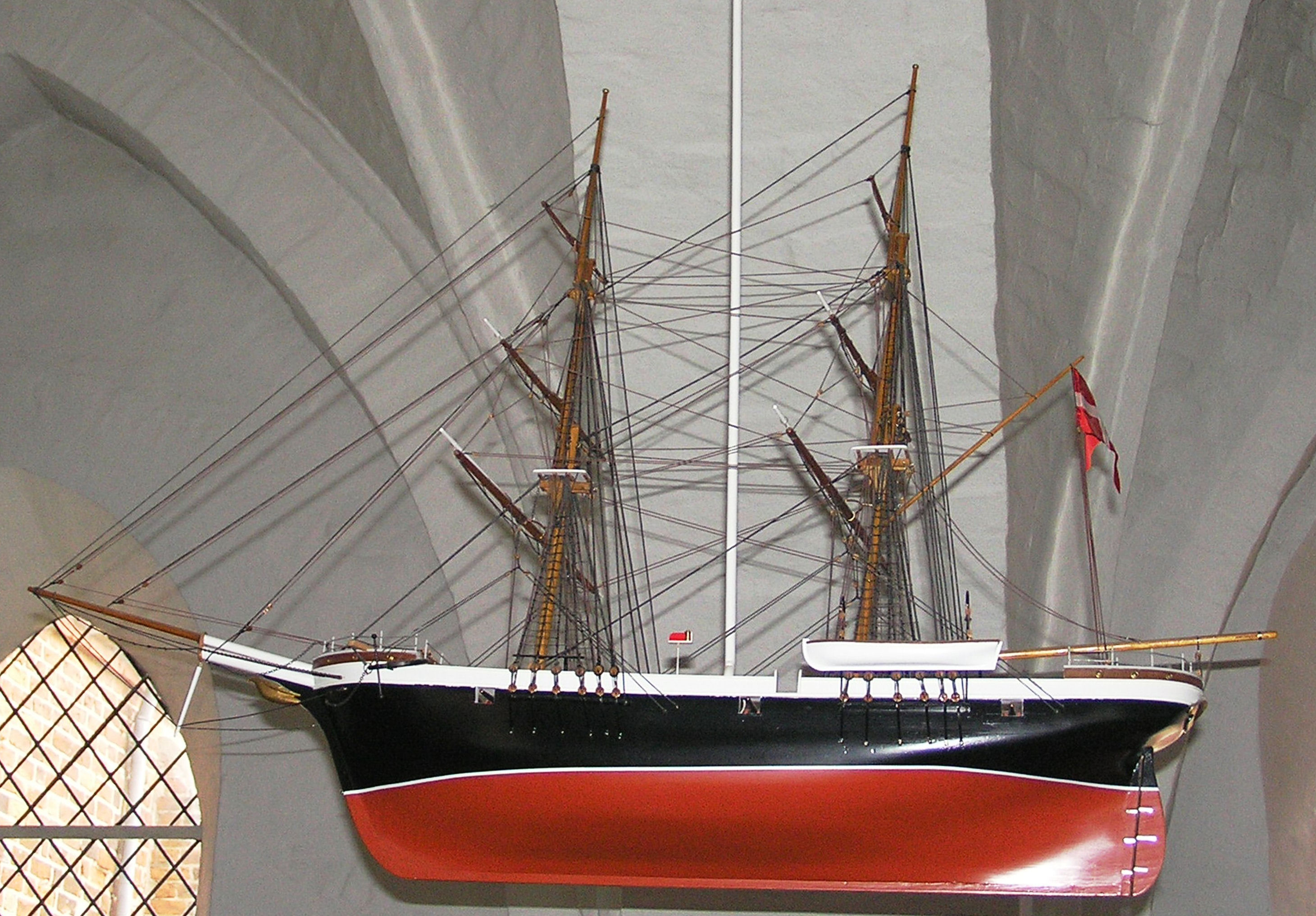 ’Ørnen’ 2 master kanonbrig med 6 kanoner, ophængt 1997-12-14 i Sankt Peders Kirke , Slagelse. Modellen udført af maler Ove Andersen, Slagelse i 1997 ’Ørnen’ blev bygget ved De forenede Oplagspladser og Værfter, Christianshavn. Stabelafløbning 1880-08-17. Afleveredes til Marinen 1880-10-27. Skibet blev Danmarks næstsidste armerede sejlskib og det udgik af flådens tal 1908-03-13